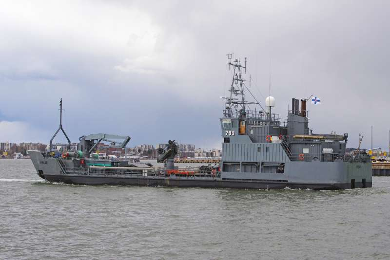 nave hylje